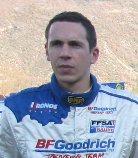 Rallye Monte Carlo 2009